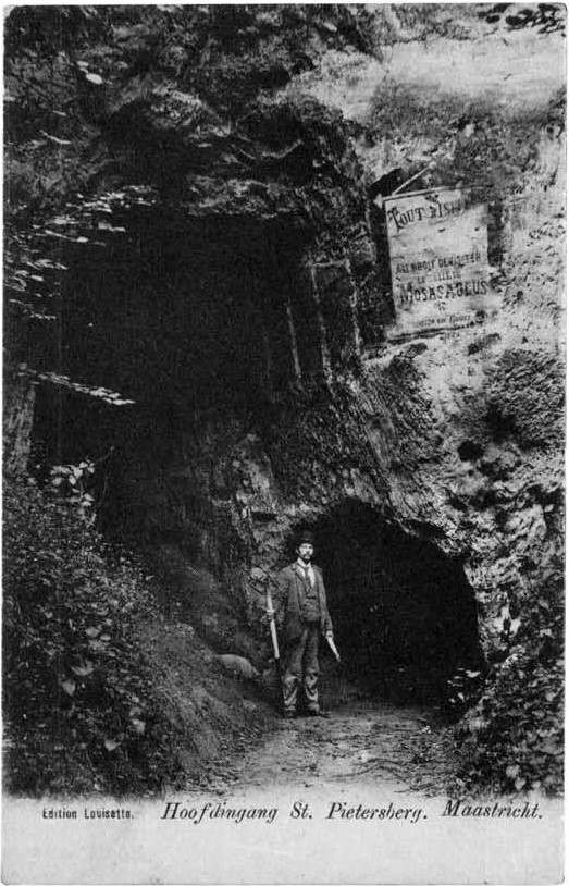 Ansichtkaart van de Slavante-ingang de Drie Poorten in 1907 met affiche